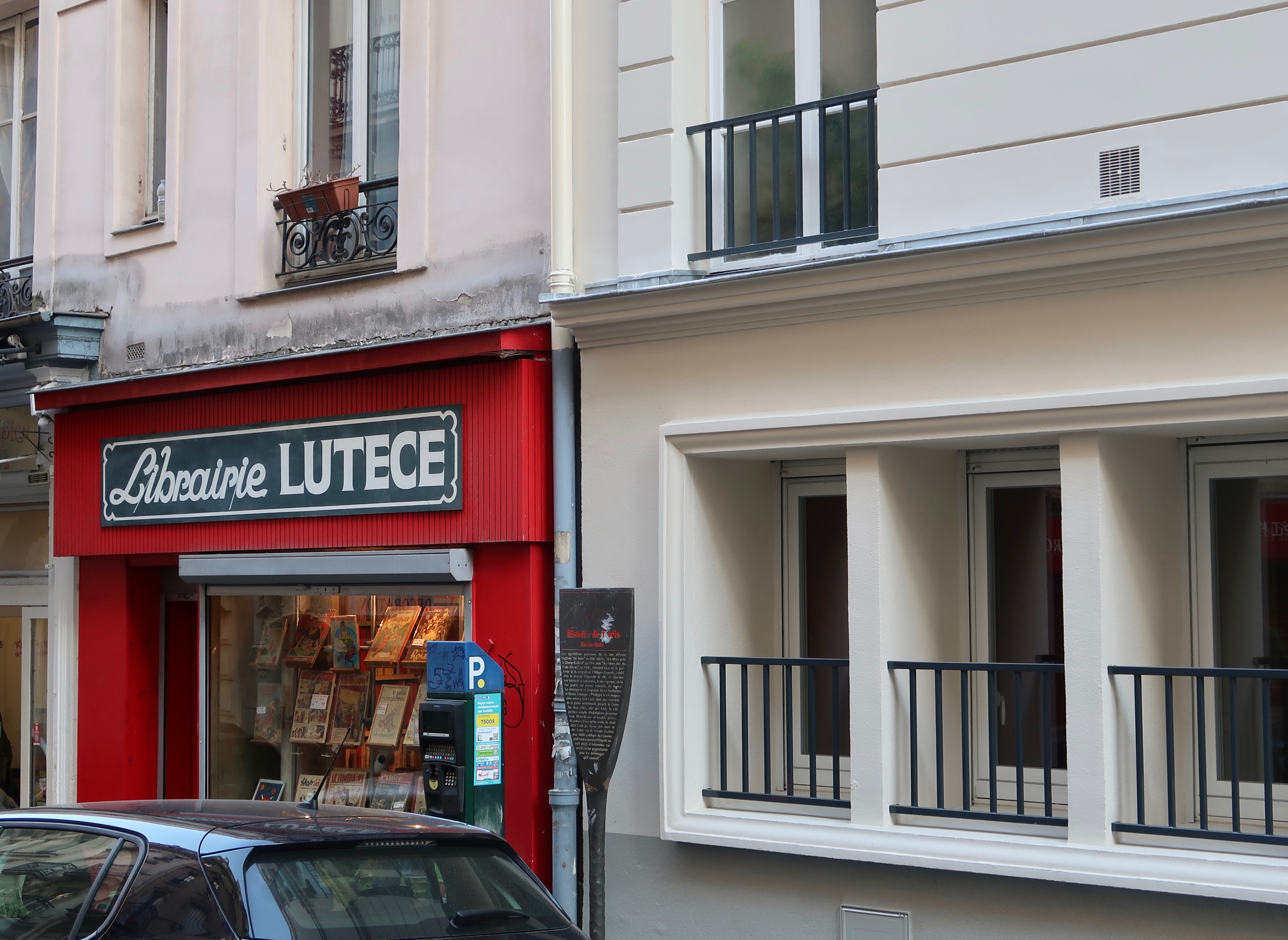 7-9 rue d'Arras (Paris, 5e). Présence d'un panneau Histoire de Paris en hommage à la rue des Murs.